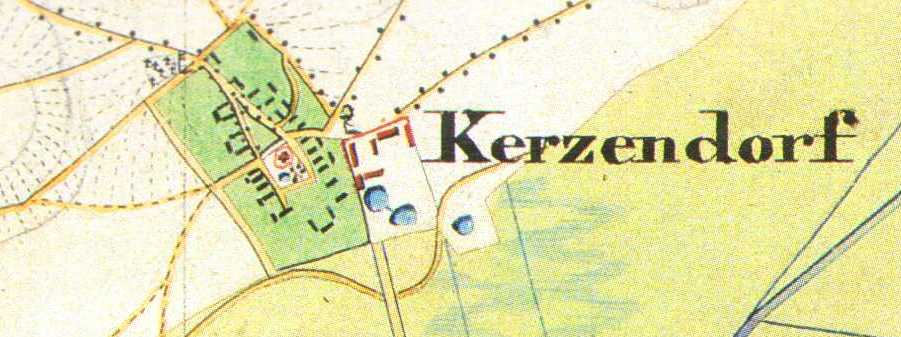 Kerzendorf auf dem Urmesstischblatt, 1:25000, Blatt Trebbin (Nr.3745) von 1840, Kerzendorf, Ortsteil von Ludwigsfelde, Brandenburg, Deutschland